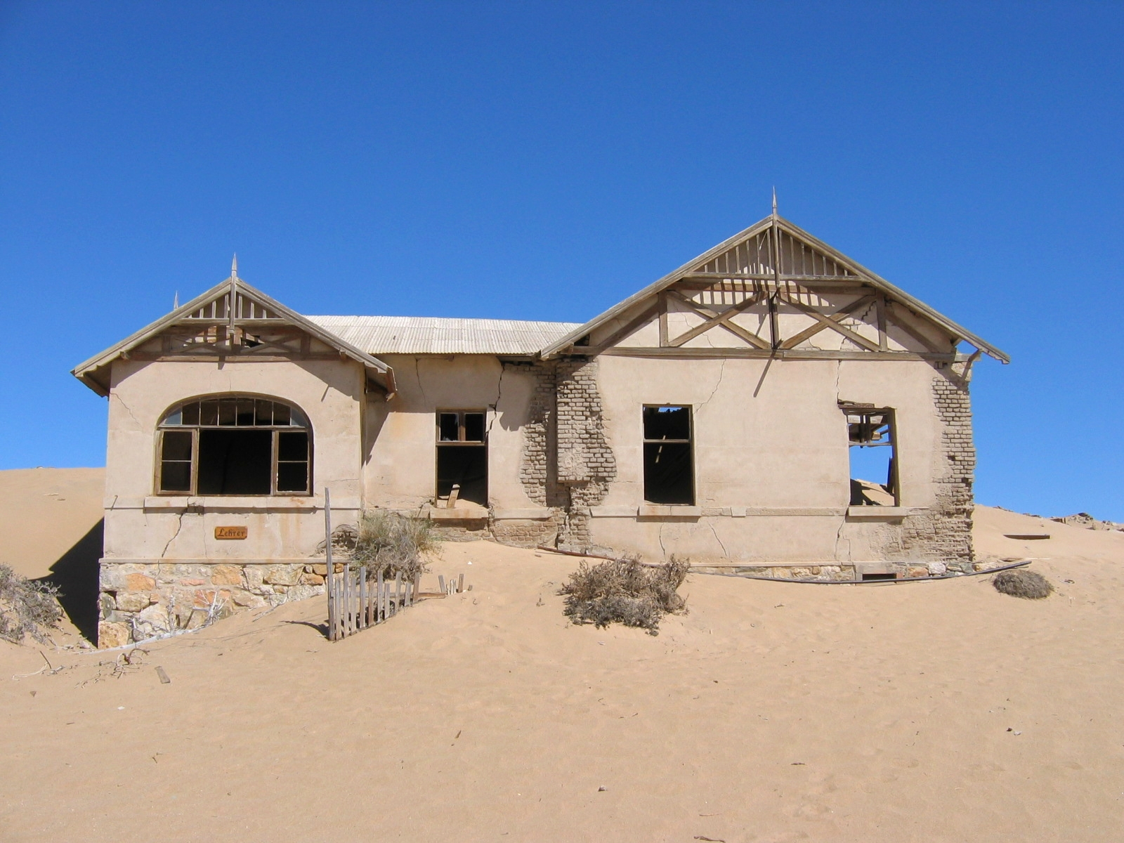 Lehrerhaus, Kolmannskuppe, Namibia